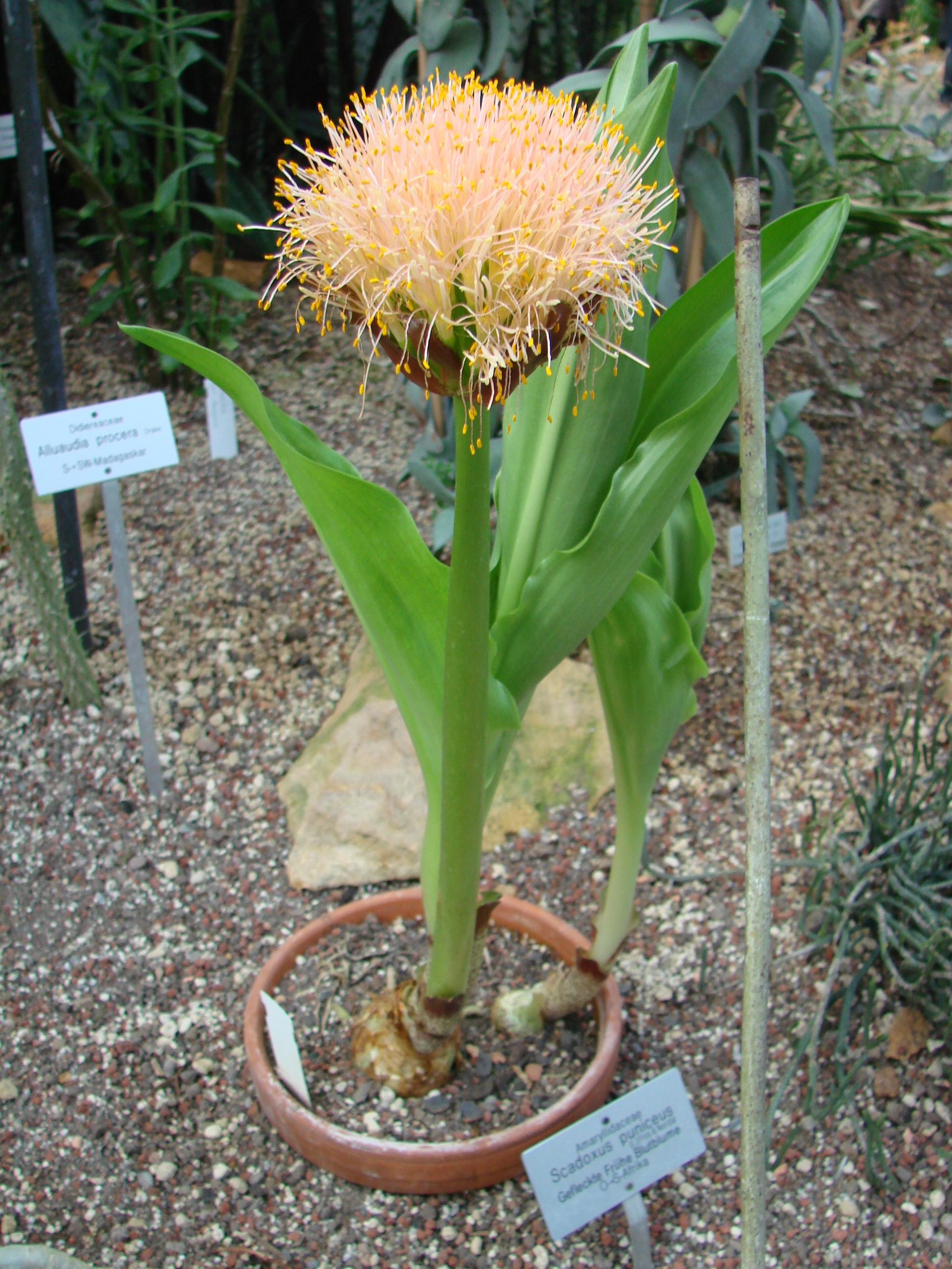 Jardin botanique de l'Université de Zurich (Suisse) : Scadoxus puniceus (L.) Friis & Nordal